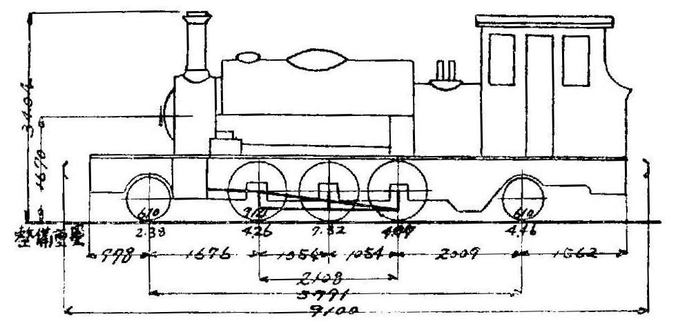 台湾総督府鉄道3形蒸気機関車形式図